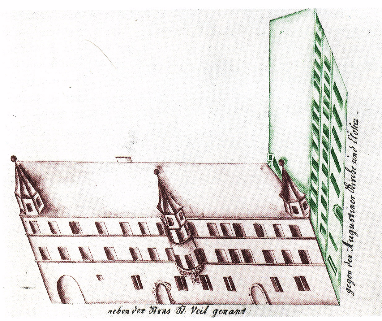 Alte Statthalterei (errichtet 1540), bestehend aus den Häusern "Zum güldenen Rost" (Rot), "Zum stolzen Knecht" (rot) und "Zur güldenen Flechte"(grün) im Jahr 1699